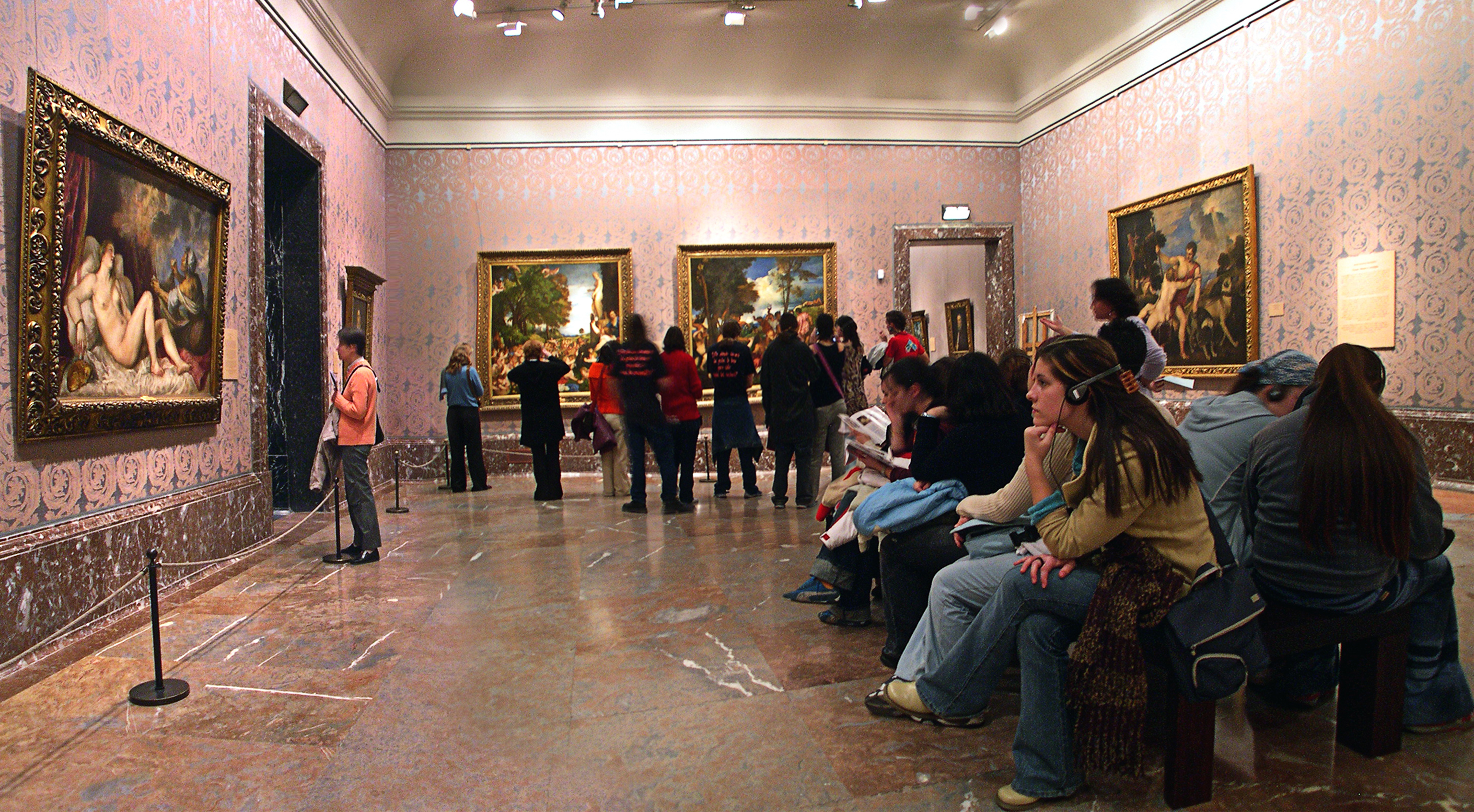 Sala de Tiziano, una de las más visitadas de El Museo del Prado, MadridObra de Juan de Villanueva